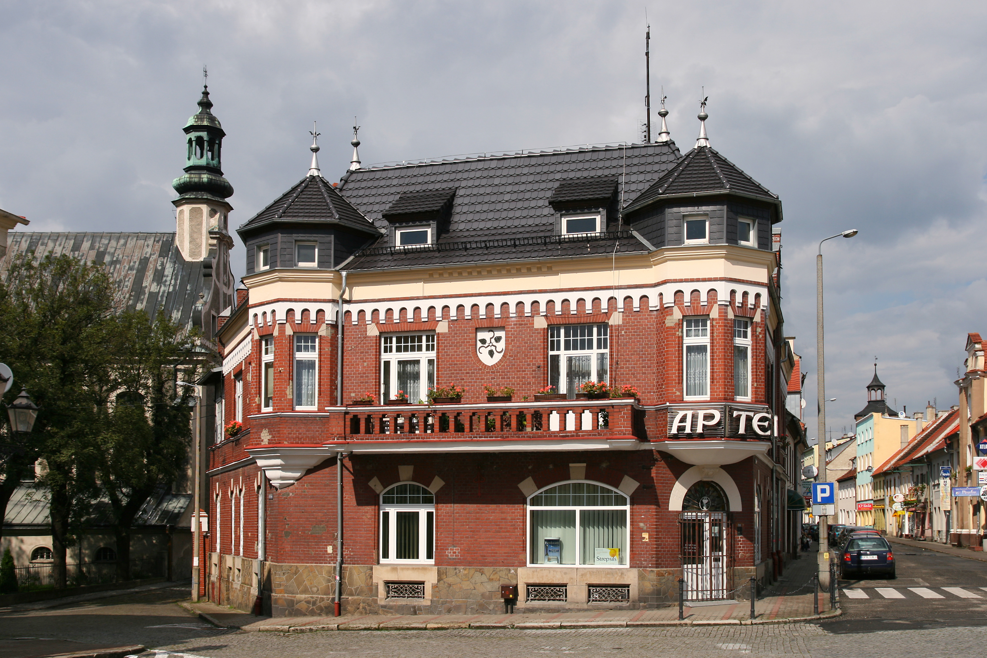 Kamienica przy Rynku w Głogówku.